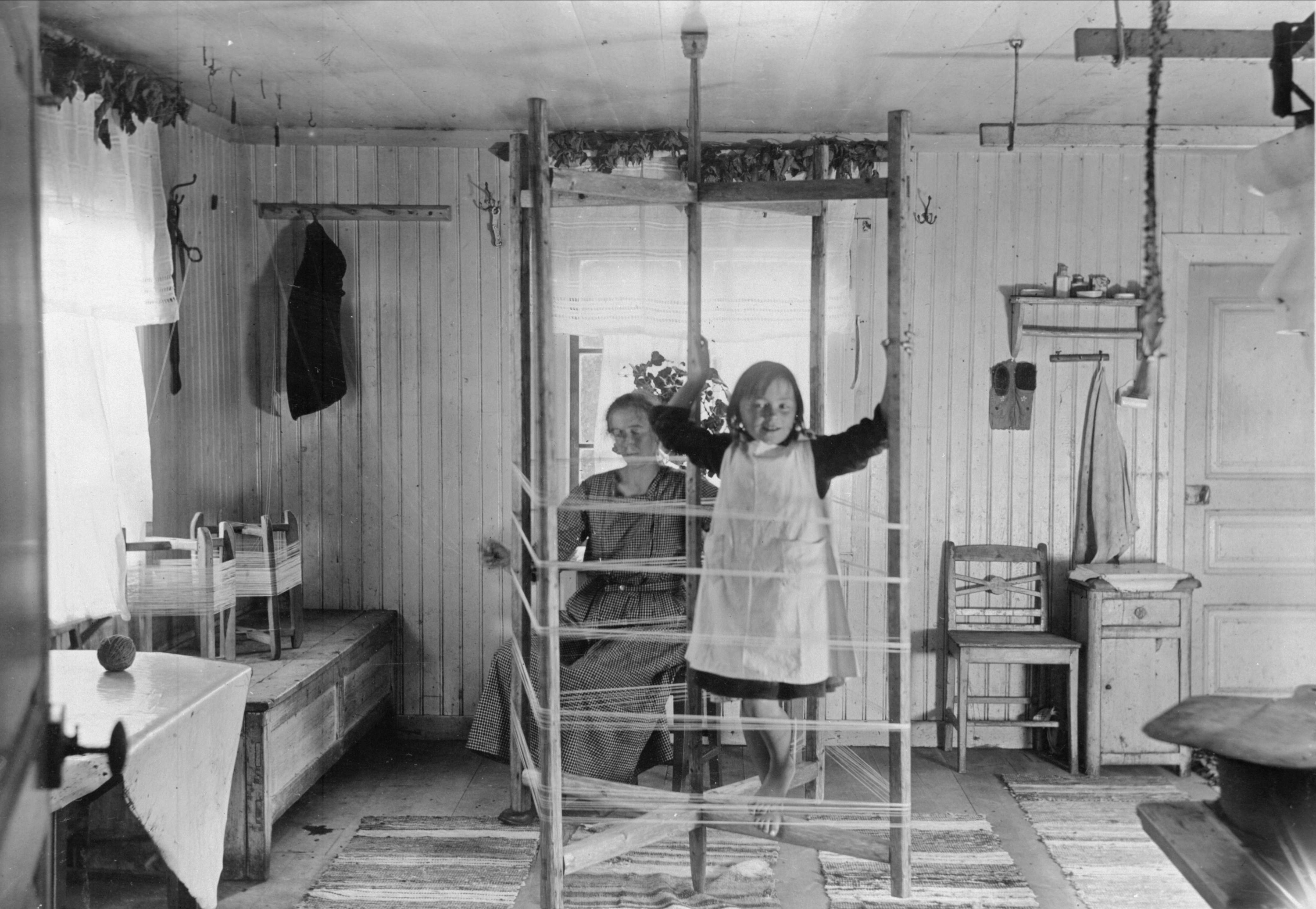 Varpning. En flicka klättrar på varpställningen.